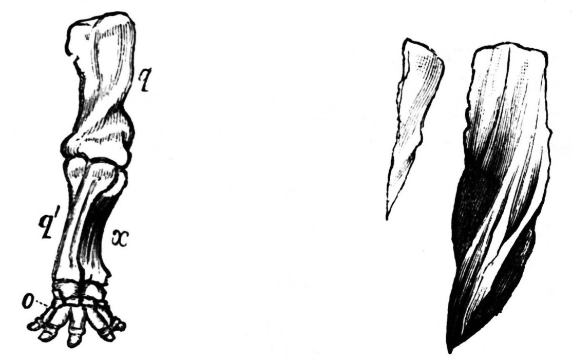 Elephant rear leg bones